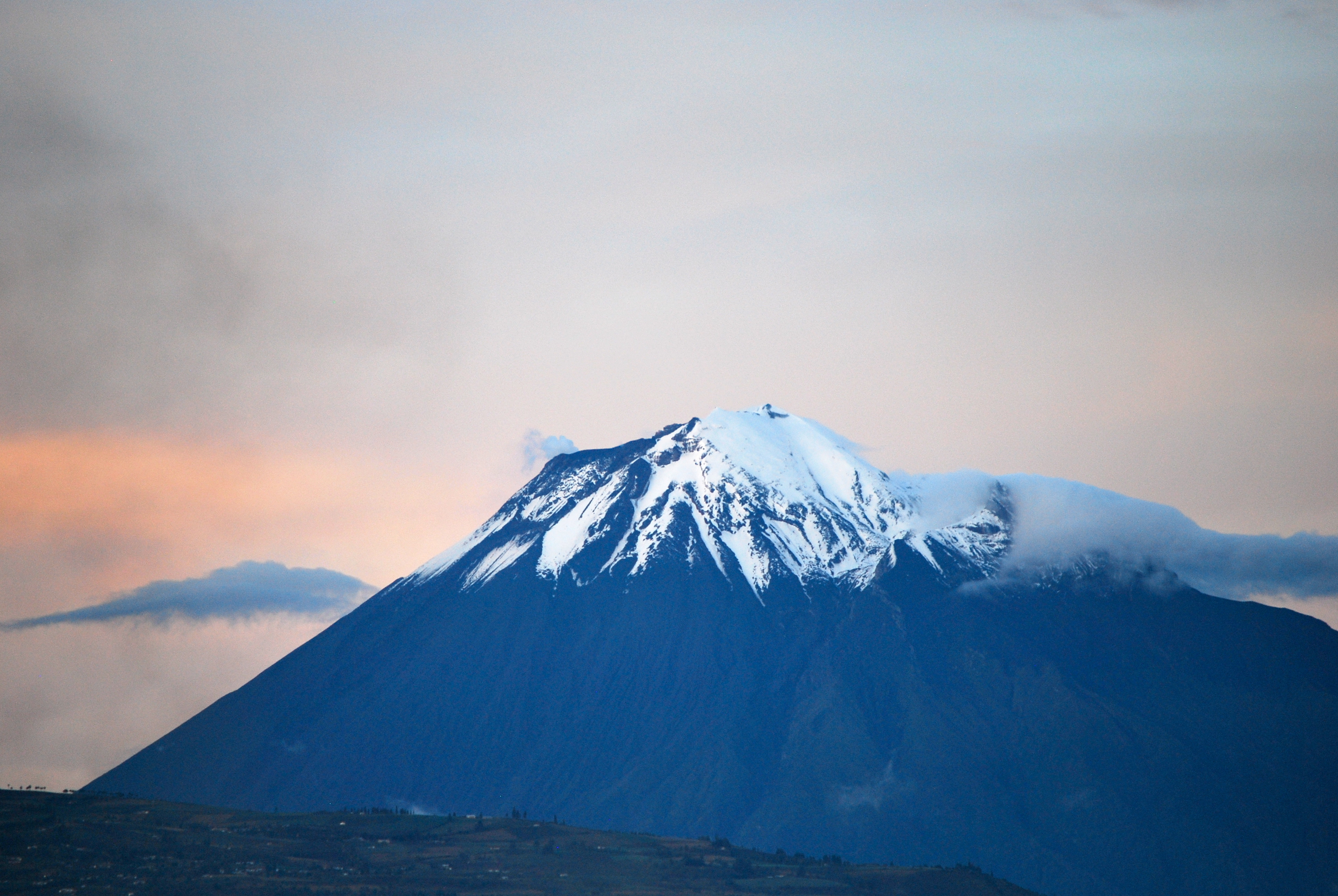 Volcán Tungurahua visto desde Riobamba - Ecuador